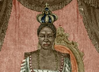 L'impératrice d'Haïti Adélina Soulouque.